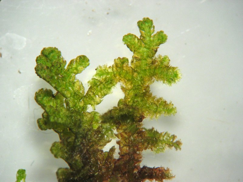 Behaartes Federchen-Lebermoos (Ptilidium ciliare), Habitus bei 10x, Rostock